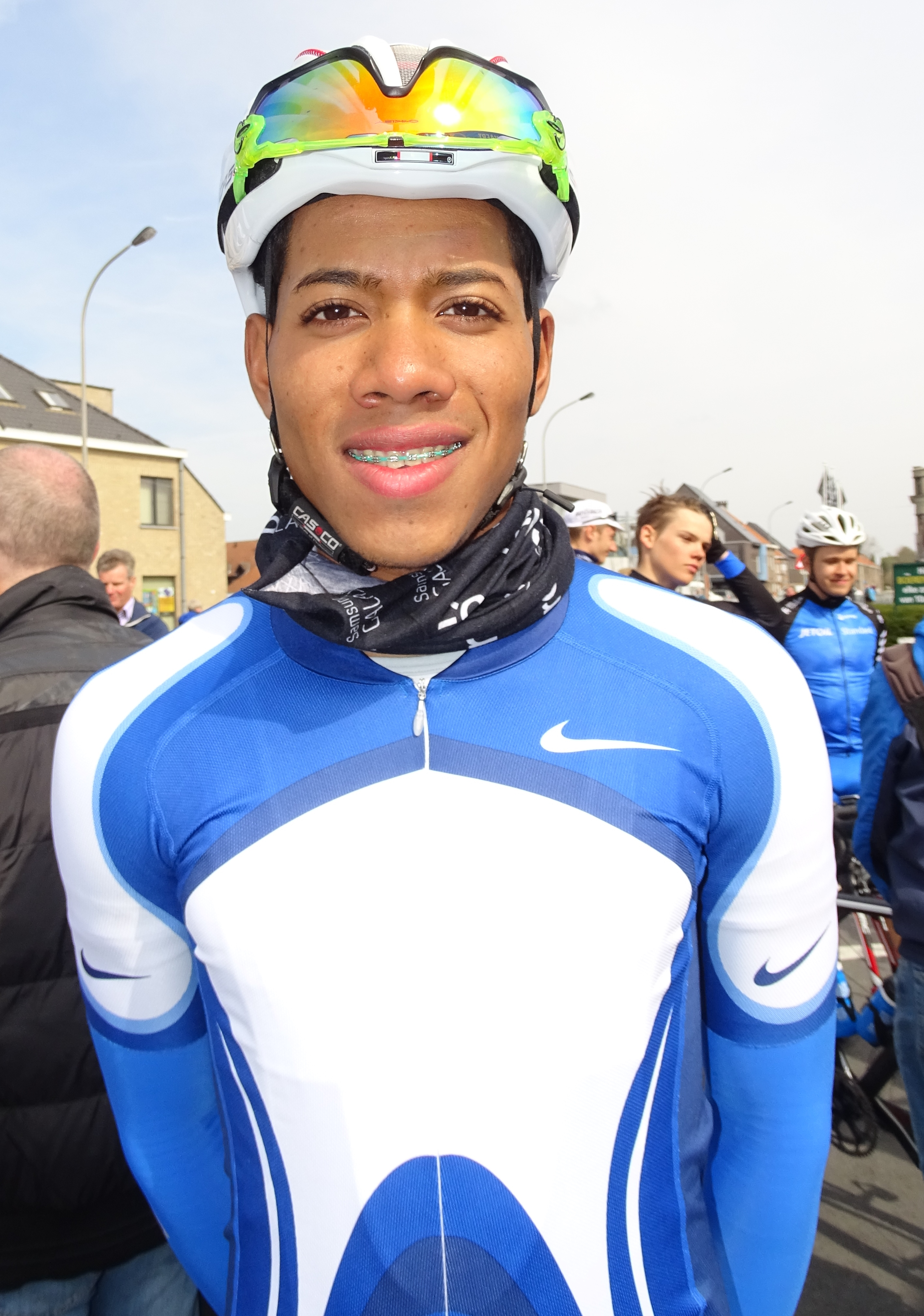 Reportage réalisé le samedi 9 avril à l'occasion du départ et de l'arrivée du Tour des Flandres espoirs 2016 à Audenarde, Belgique.